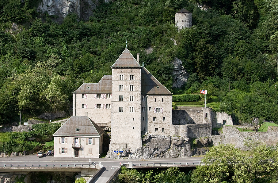 Château, Tour Dufour et ancien octroi de douane à St-Maurice